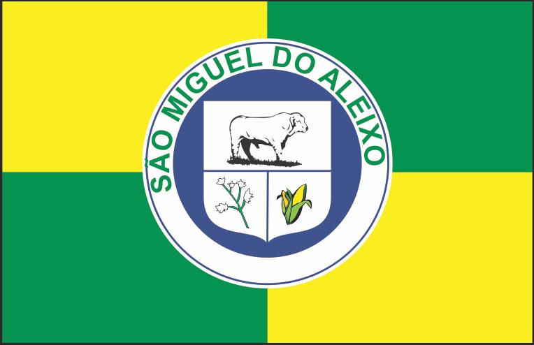 Bandeira Município de São Miguel do Aleixo